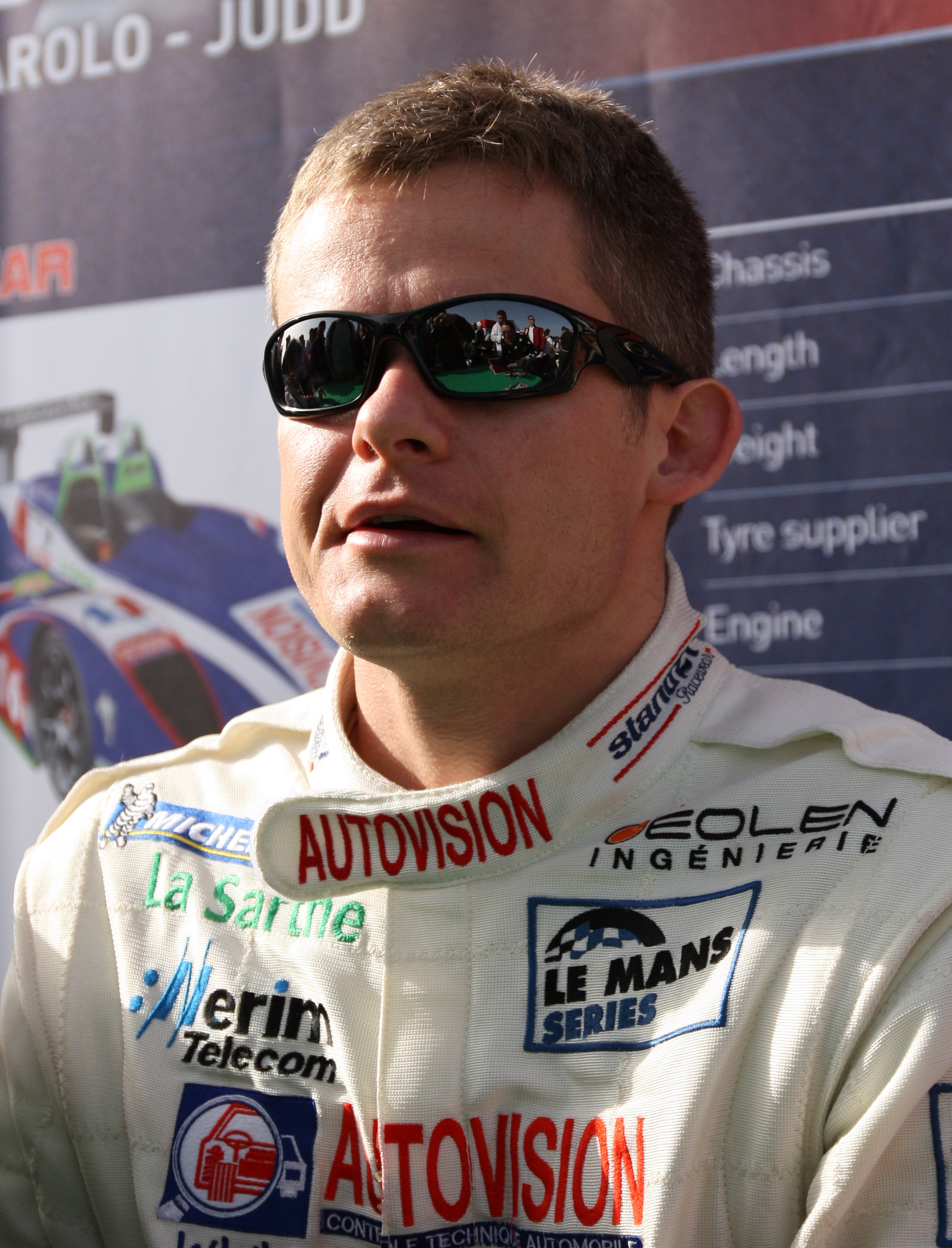 Emmanuel Collard Vainqueur des 6 Heures du Castellet en 2011